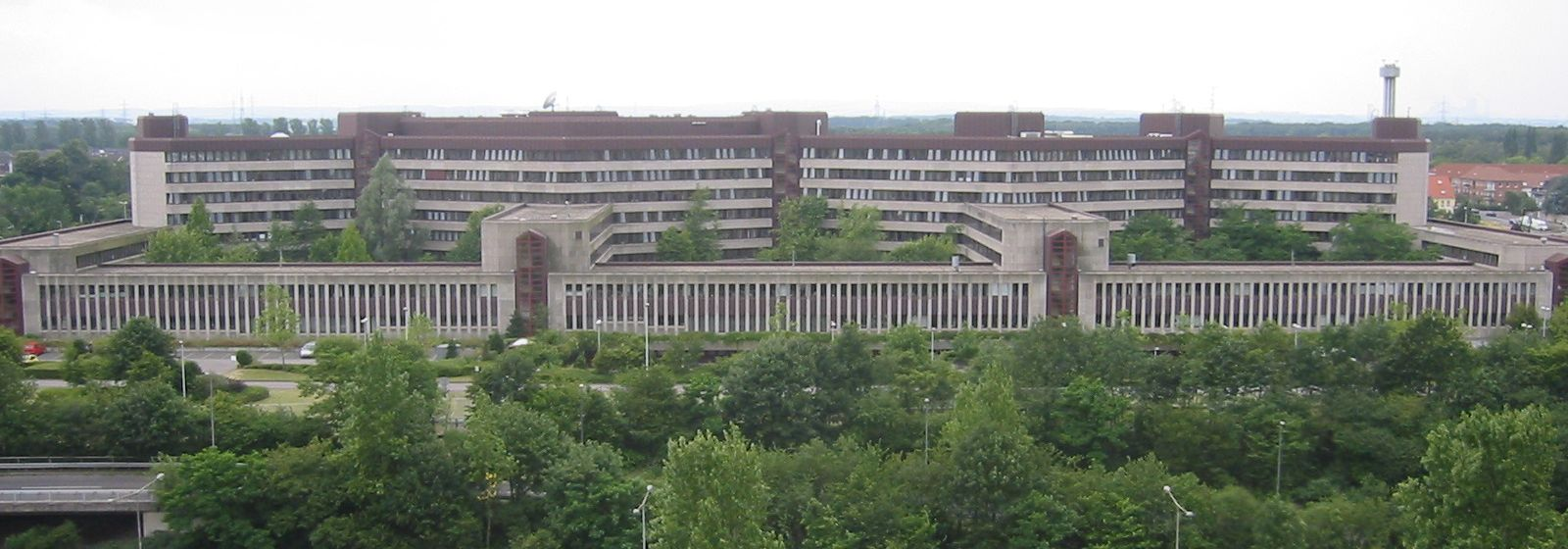 Bundesamt für VerfassungsschutzFotograf: A. Kirch